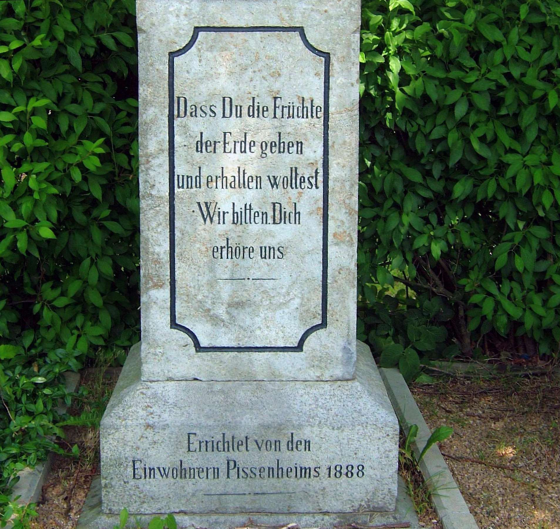 Sockel des Weißen Kreuzes in Werthhoven am Züllighovener Weg